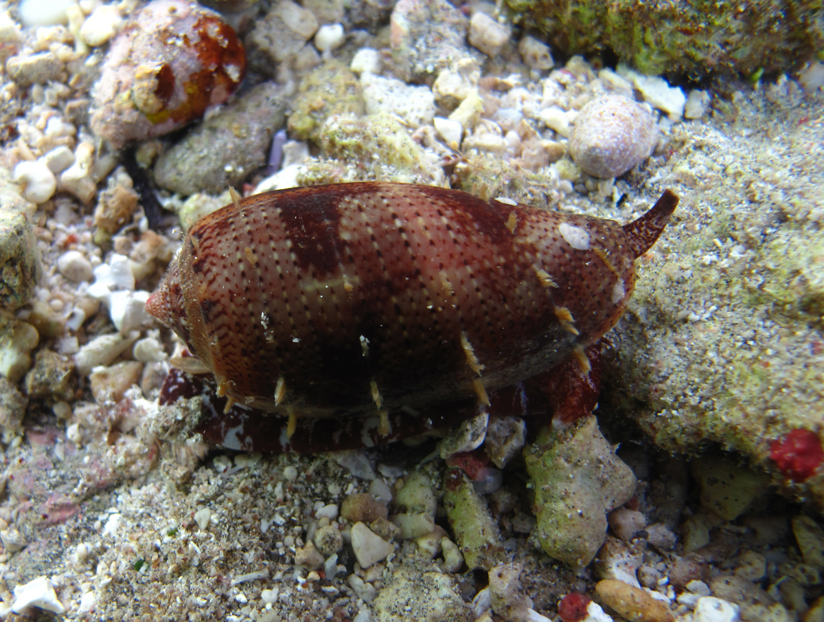 Conus tulipa (quoique ressemblant à Conus achatinus, mais distingué par les touffes de soies le long des lignes spirales de la coquille) à la Réunion.